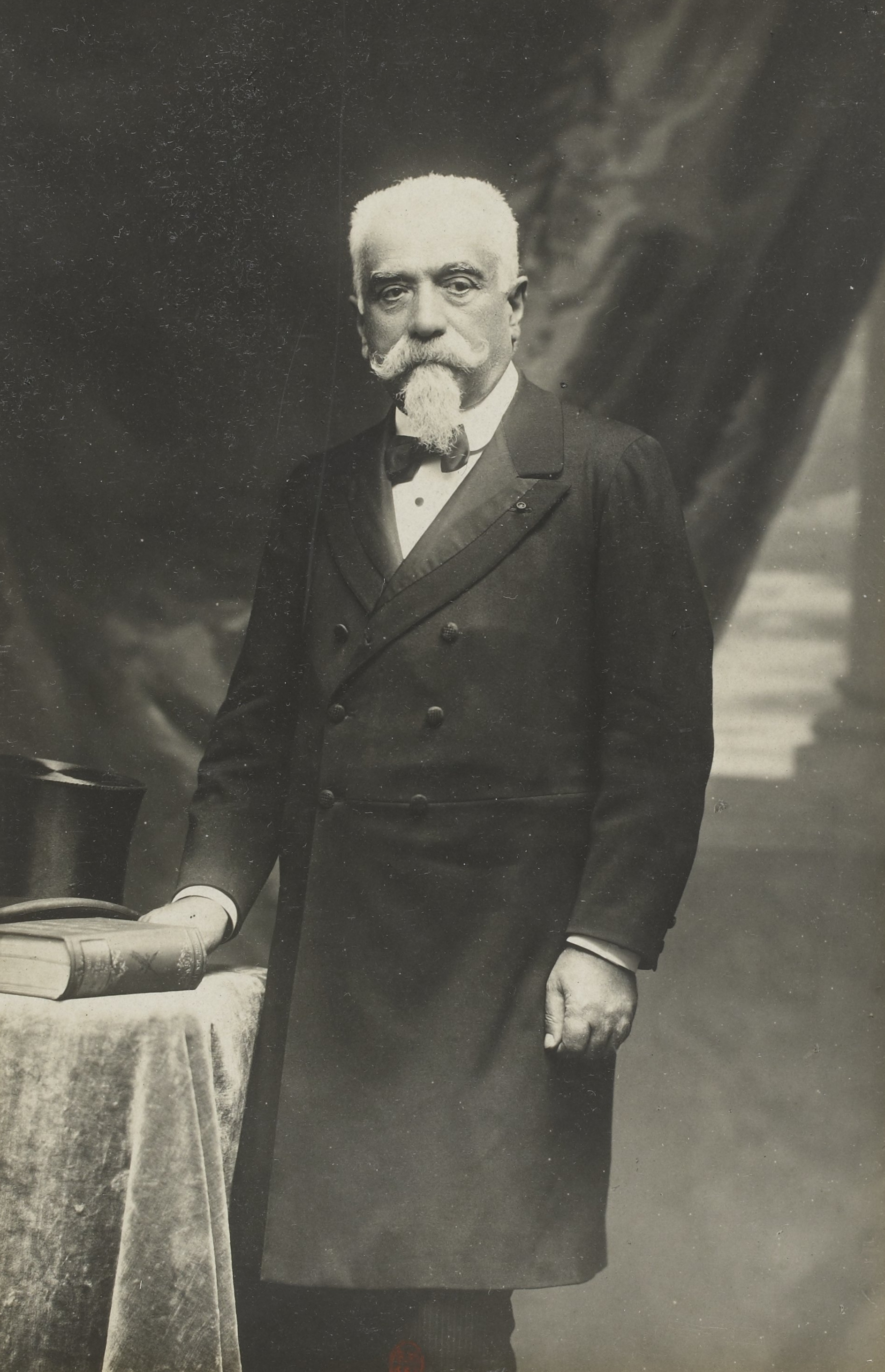 Exposition universelle de 1900 : portrait de Tommaso Villa.